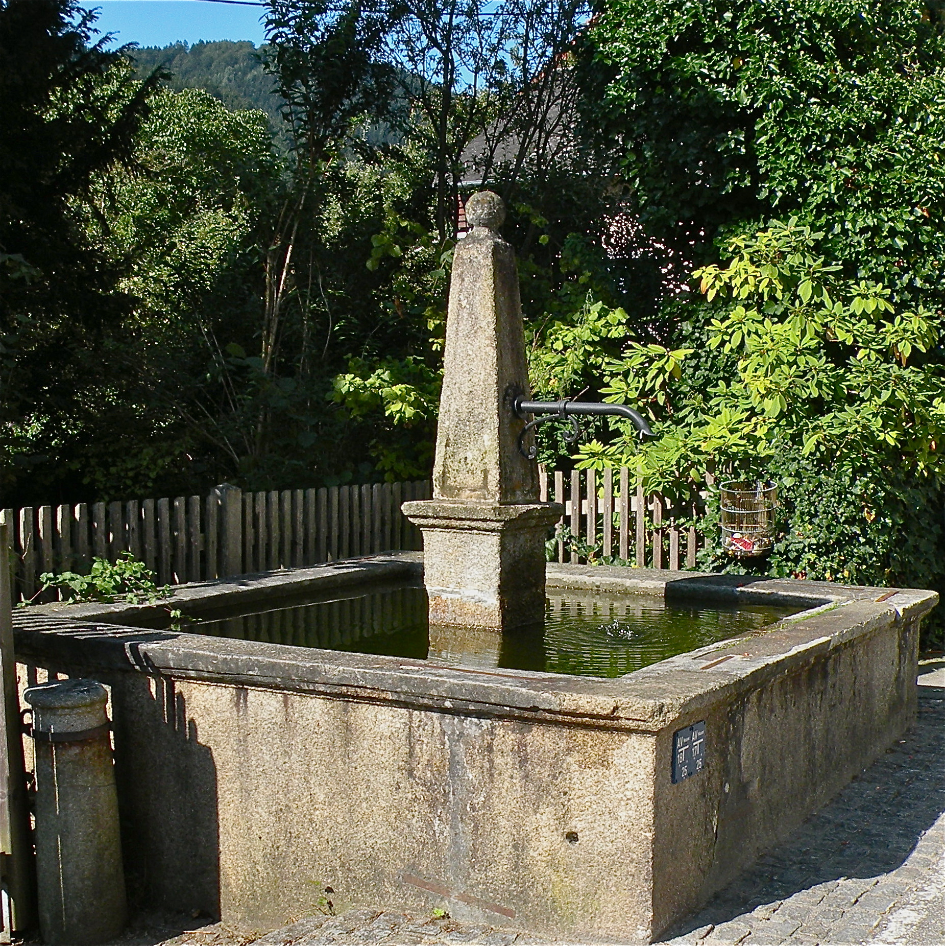 Marktbrunnen im ehemaligen Markt und heutigem Ortsteil Struden in Sankt Nikola an der Donau im Bezirk Perg in Oberösterreich